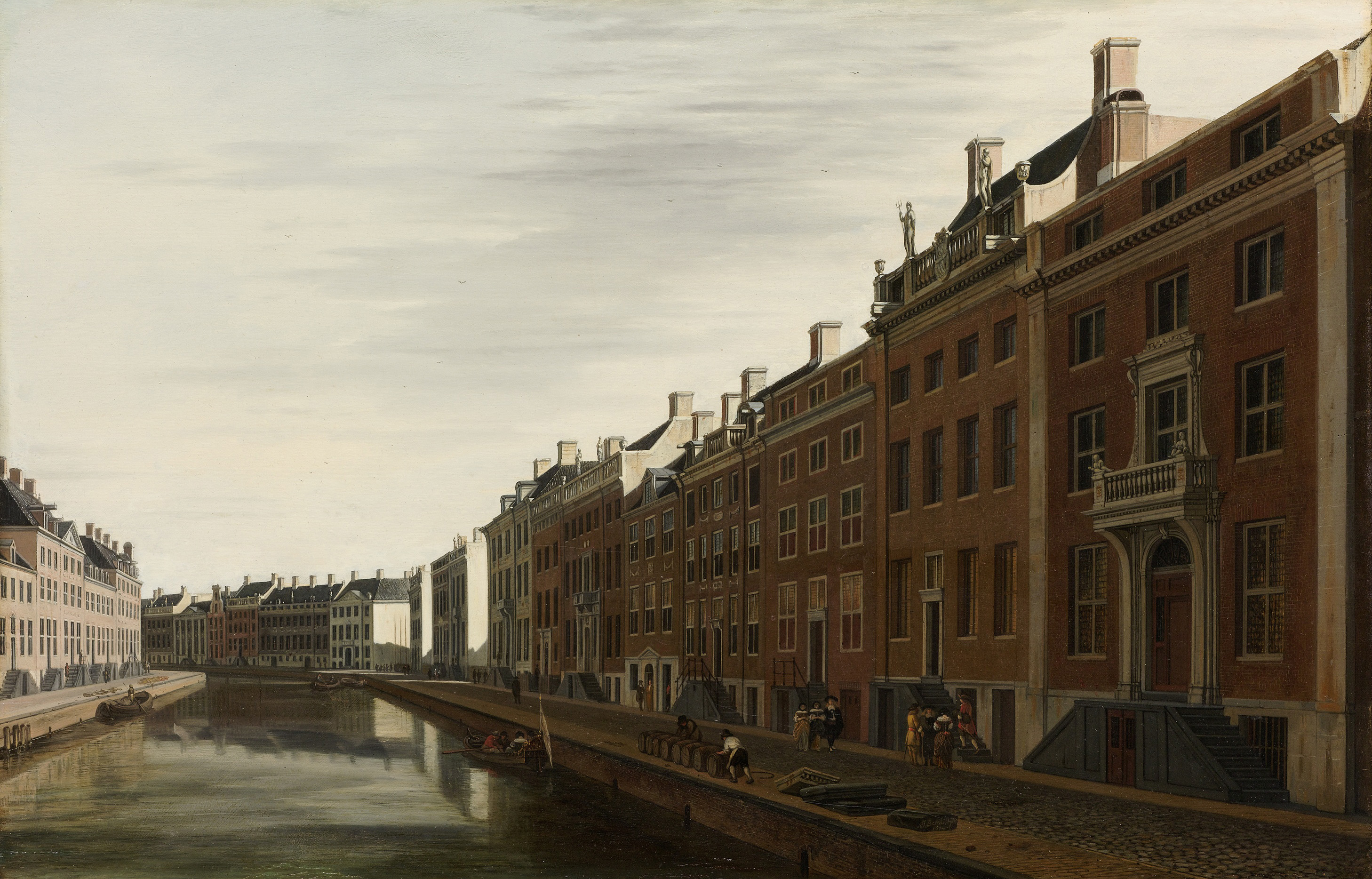 De bocht van de Herengracht bij de Nieuwe Spiegelstraat te Amsterdam, gezien vanaf de Leidsestraat.; Gerrit Adriaensz Berckheyde (1638–1698), olieverf op paneel, 1672